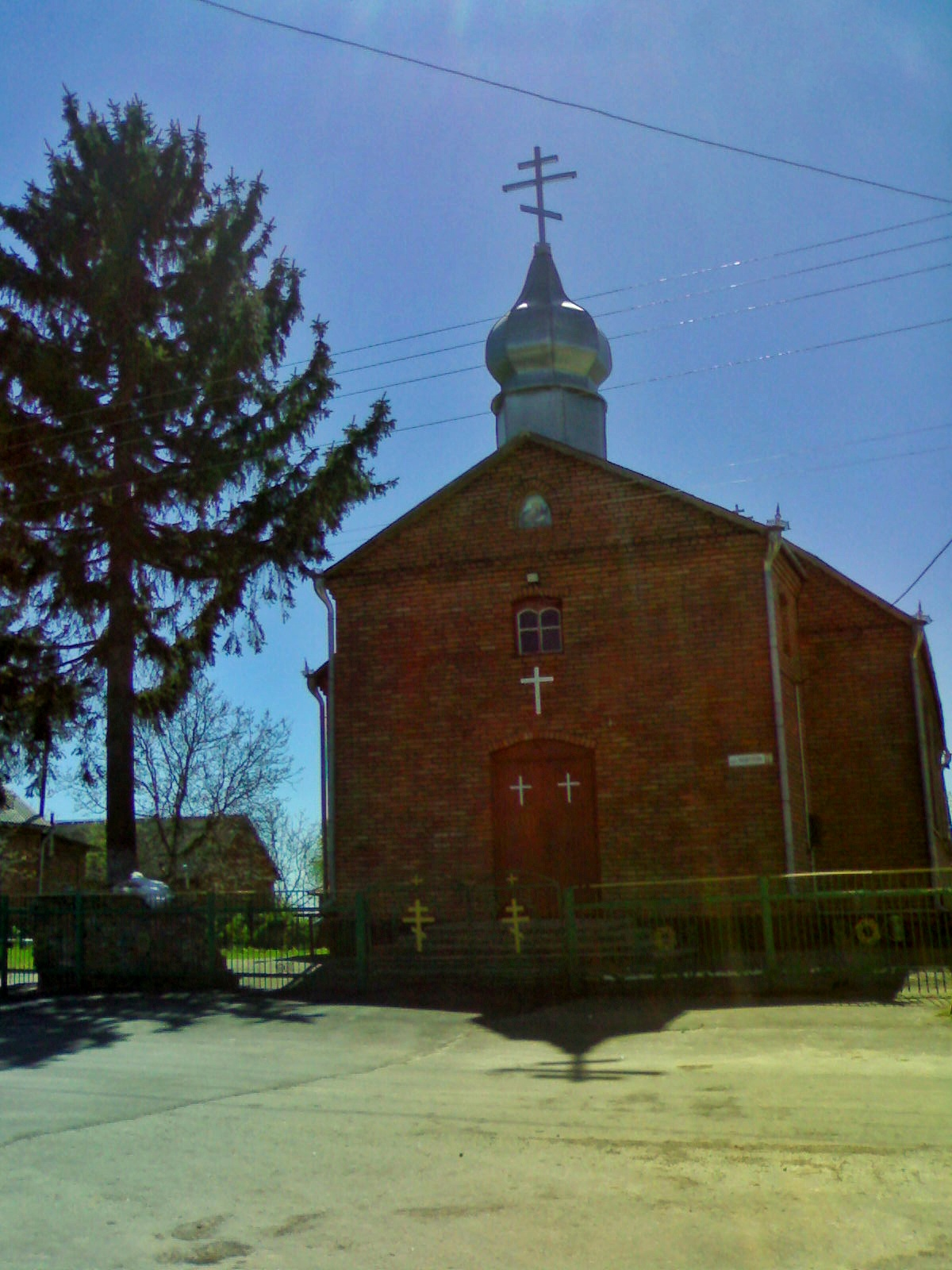 Церква Іоанна Богослова, с.Давидківці